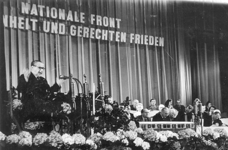 Berlin, III. Deutscher Volkskongreß, Rede Kastners Illus/Heilig Die Tagung des III. Deutschen Volkskongresses. Am 29. und 30. Mai 1949 tagte in der Deutschen Staatsoper in Berlin der III. Deutsche Volkskongress. Der Hauptpunkt der Tagesordnung lautete "Deutschland und die Pariser Konferenz", über den Otto Nuschke (CDU), Prof. Dr. Hermann Kastner (LDP) und Vincenz Müller (NPD) referierten. Anschließend an die Aussprache über diesen Punkt der Tagesordnung wählte der III. Deutsche Volkskongreß die deutsche Delegation zur Pariser Konferenz der Aussenminister. Vor der Neuwahl des Deutschen Volksrates bestätigte der Kongreß den Volksratsbeschluß vom 19. März 1949 über die Verfassung der Deutschen Demokratischen Republik. UBz: Prof. Kastner bei seinen Ausführungen. Aufn.: Illus/Heilig 3342-49 29.5.49 Abgebildete Personen: Kastner, Hermann Prof. Dr.: Stellvertretender Ministerpräsident, Liberal-Demokratische Partei Deutschlands (LDPD), DDR